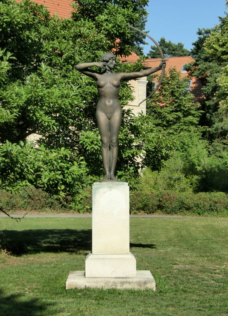 Ferdinand Lepcke: Bogenspannerin. Bronze, 1909. Hohenzollernplatz, Berlin-Nikolassee. Hier aufgestellt 1997, ursprünglicher Standort an der Nationalgalerie.